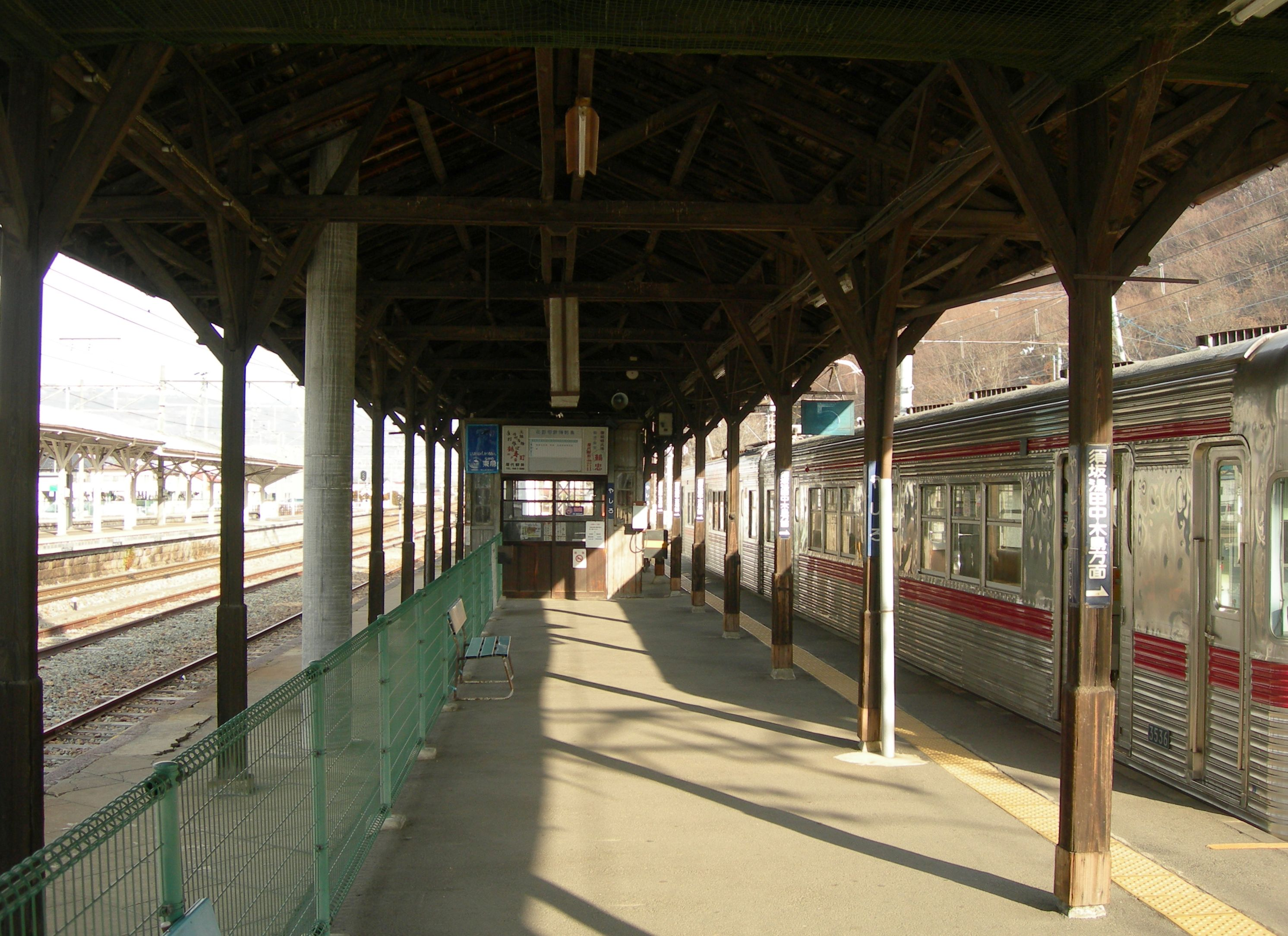 屋代駅ホーム